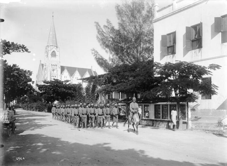 Polizeitruppe in Daressalam vor 1914